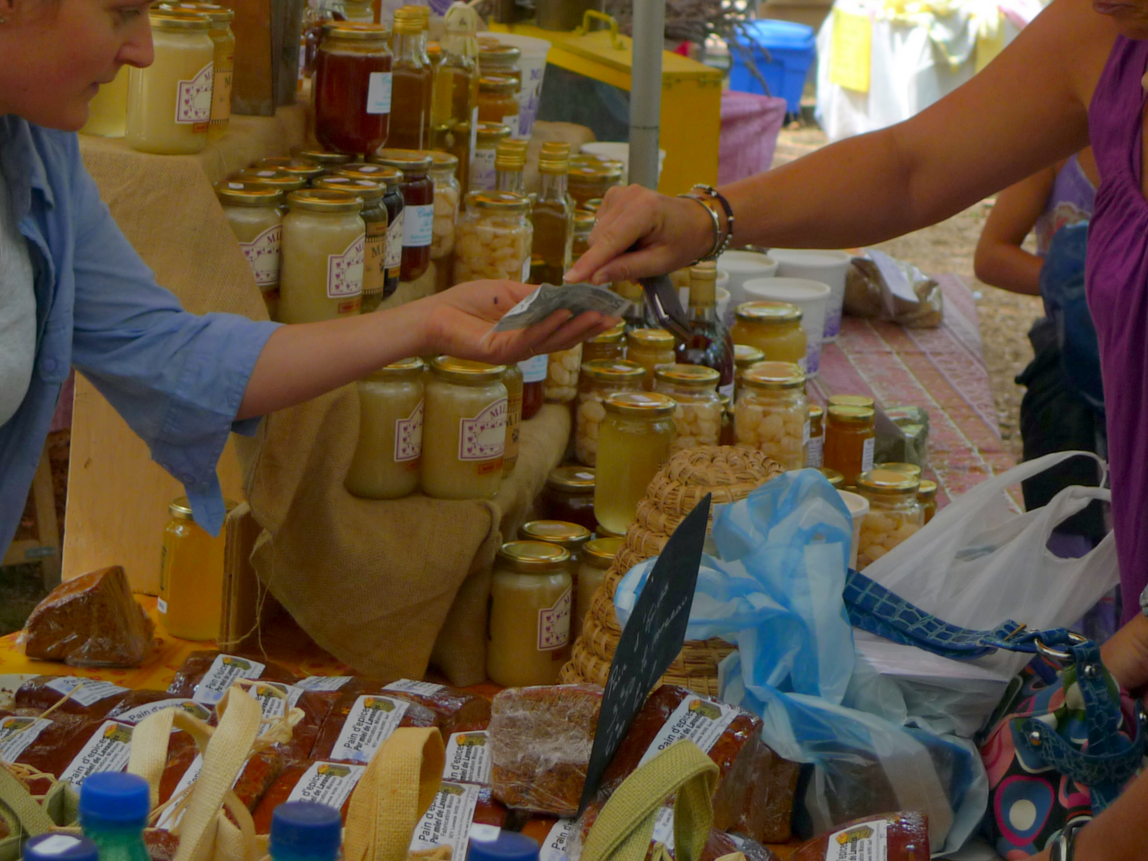 Miel et pains d'épice sur le marché de Sault